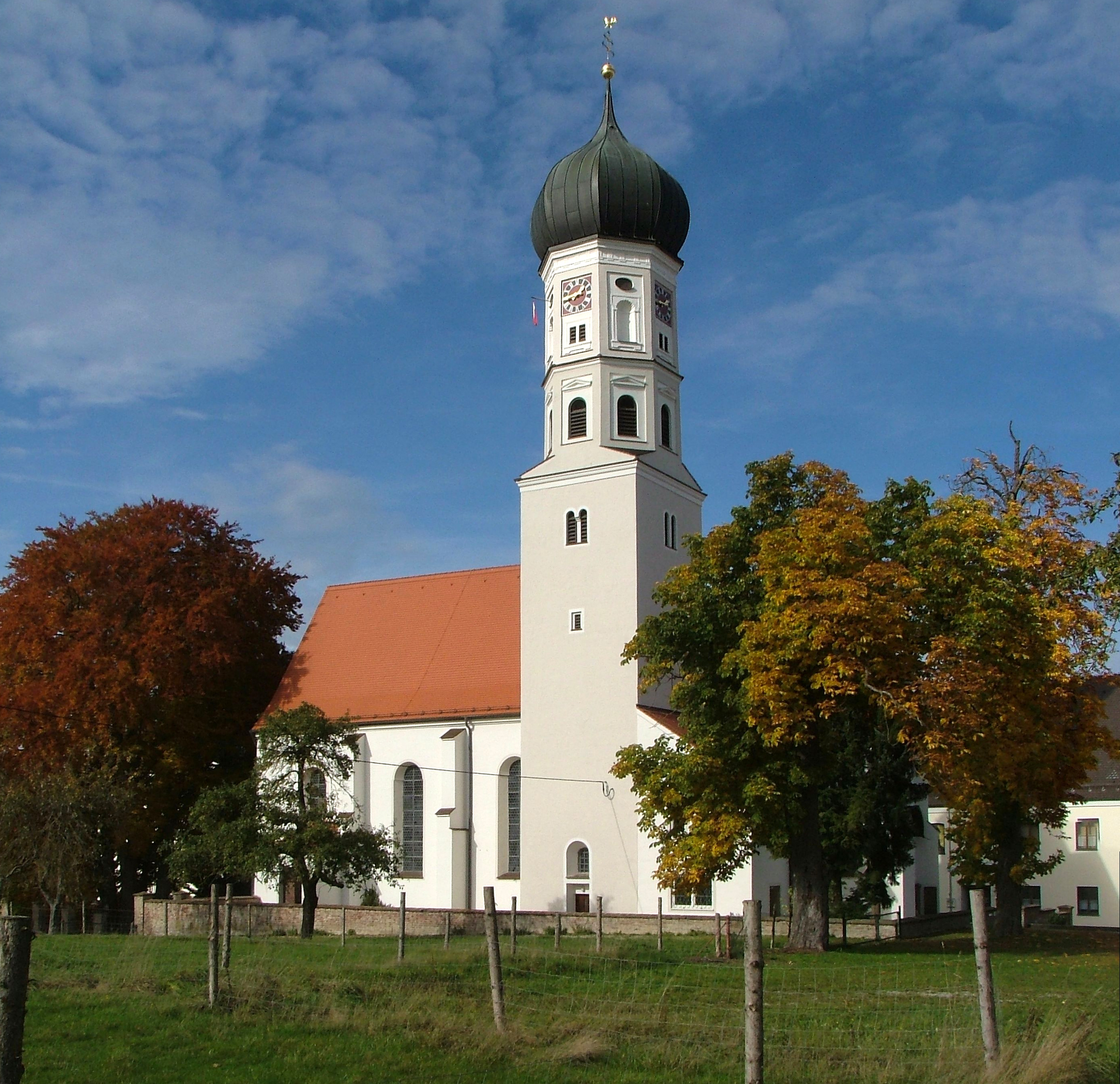 Bedernau